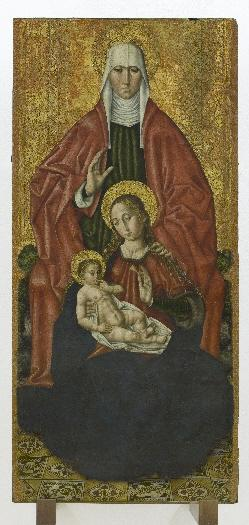 La obra representa a Santa Ana junto a su hija, la Virgen María, que lleva en brazos a su vez a su hijo, el Niño Jesús.